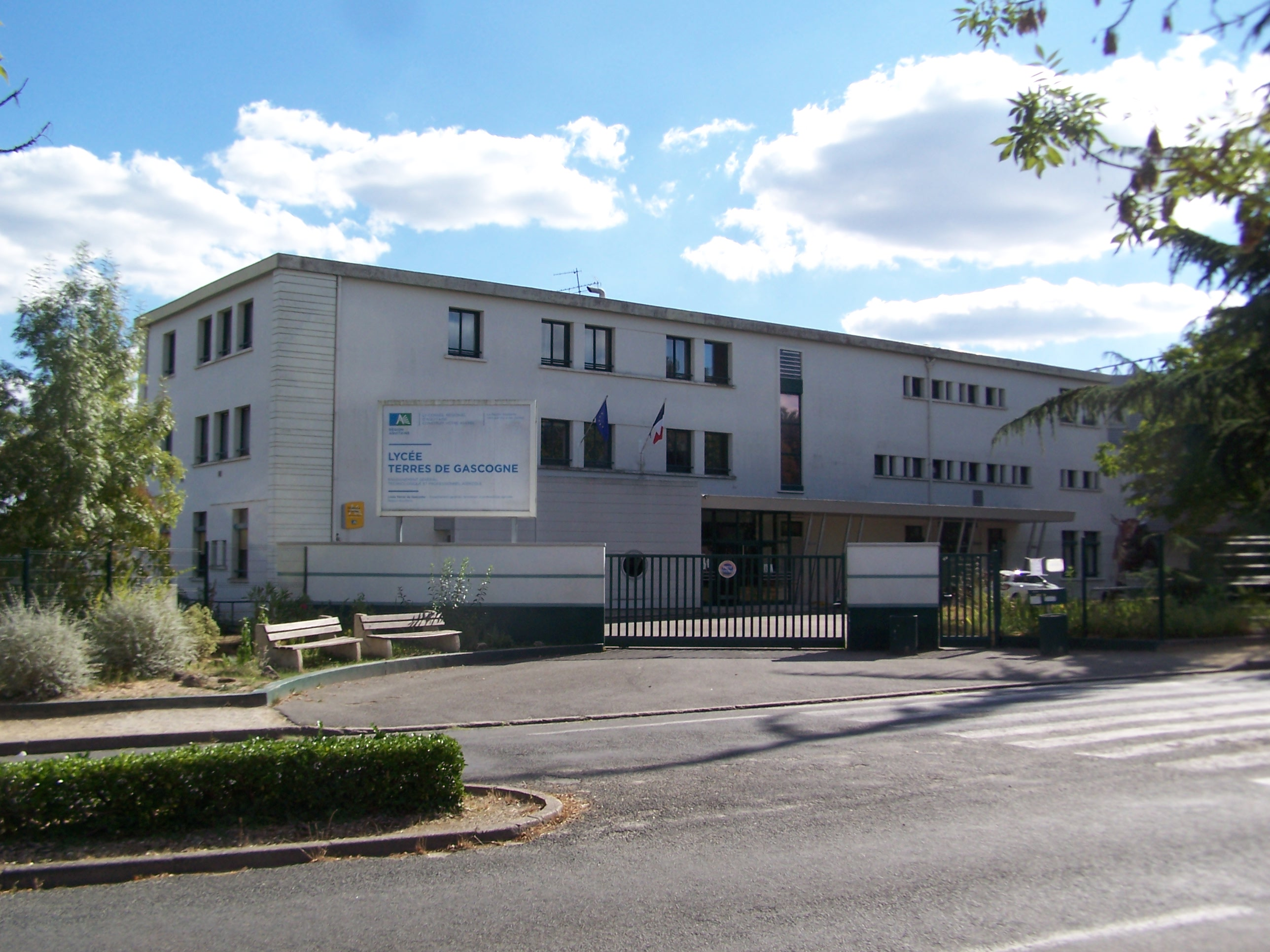 Lycée des Terres de Gascogne à Bazas, Gironde, France